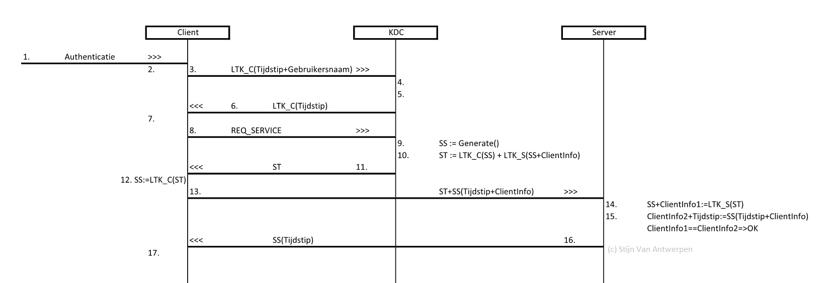 Een schema over het kerberos protocol. De nummering komt overeen met de nummering gebruikt in het wikipedia artikel.